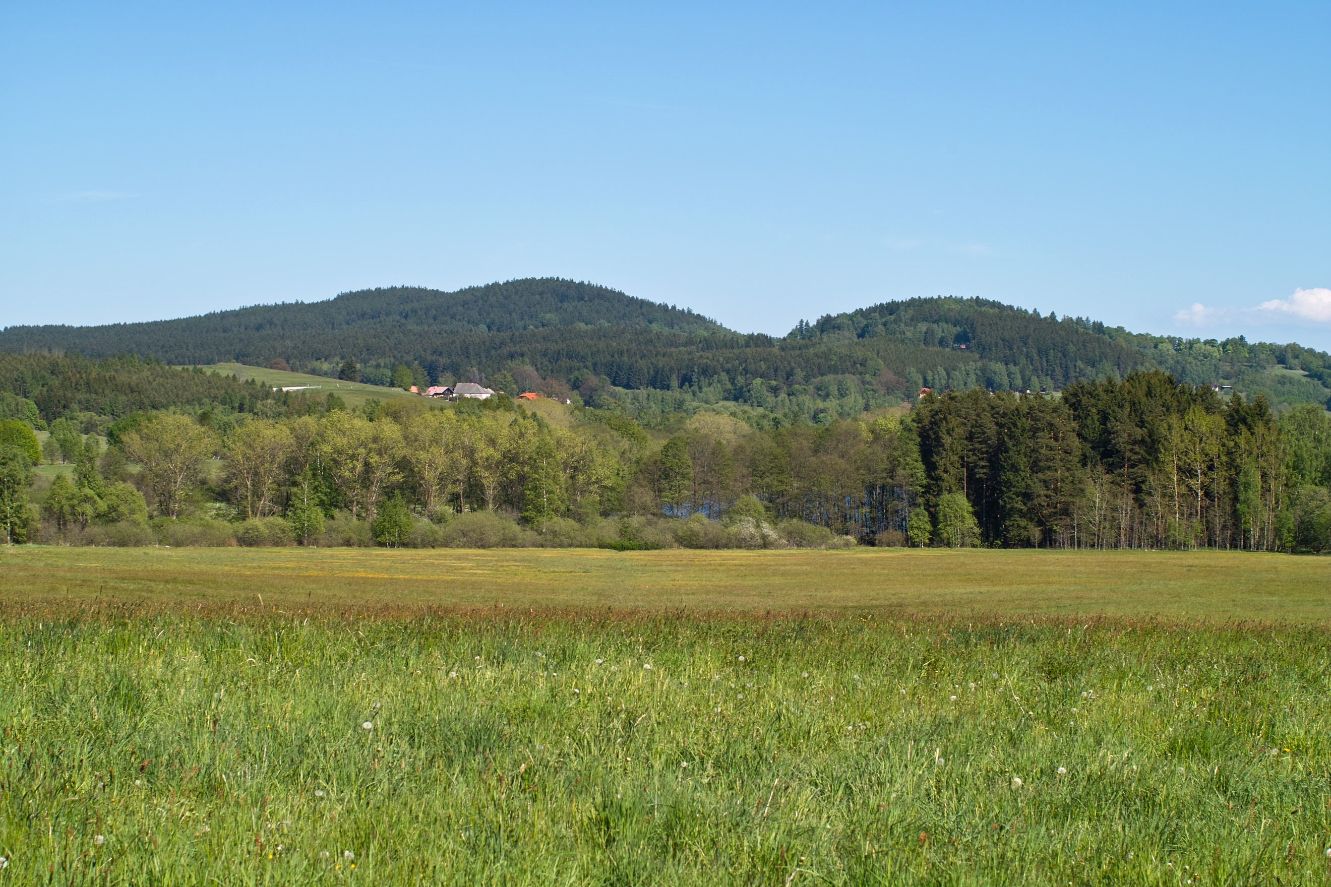 Pihlov u Horní Plané a Houbový vrch (907, 914 a 914 m. n. m.) ve vojenském újezdu Boletice